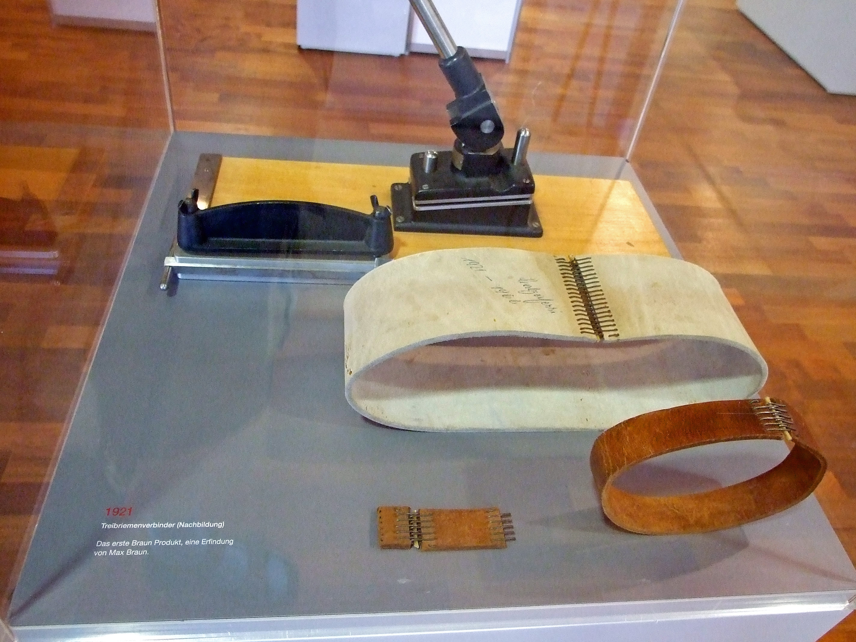 Treibriemenverbinder (Nachbildung), das erste Braun Produkt, von Max Braun persönlich, in der Braun Collection in Kronberg